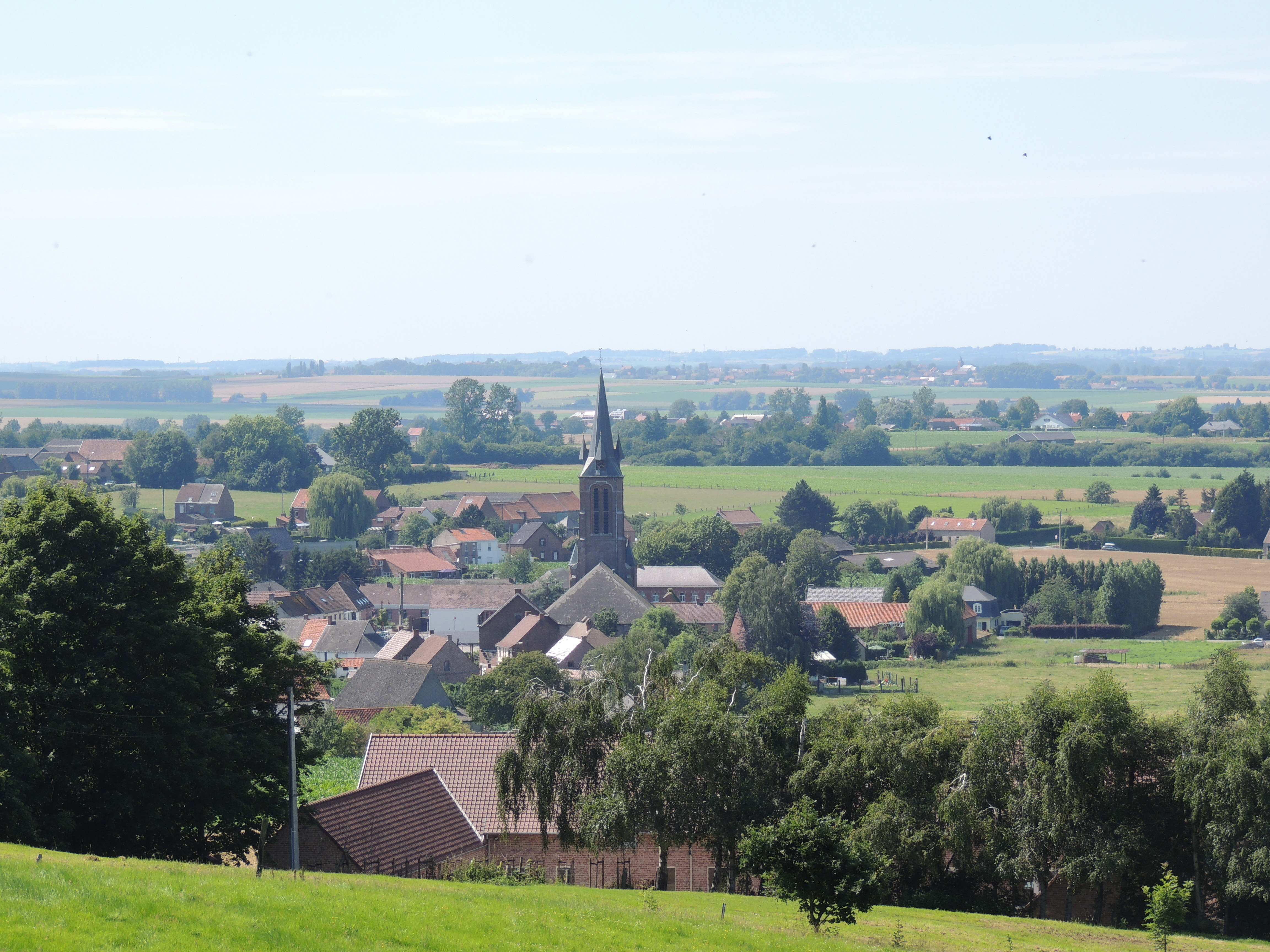 Dorpskern van Saint Sauveur vanuit de hoogte gezien